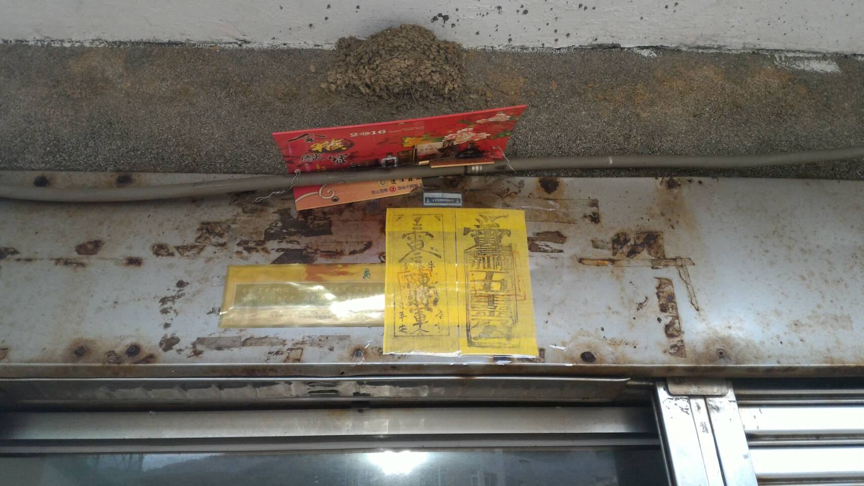 馬祖地區村莊補庫後，民宅張貼補庫符